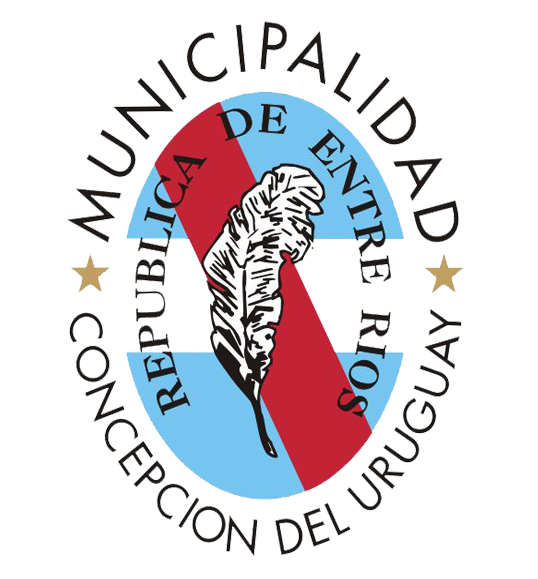 Concepciòn del Uruguay, Logo de la Municipalidad.